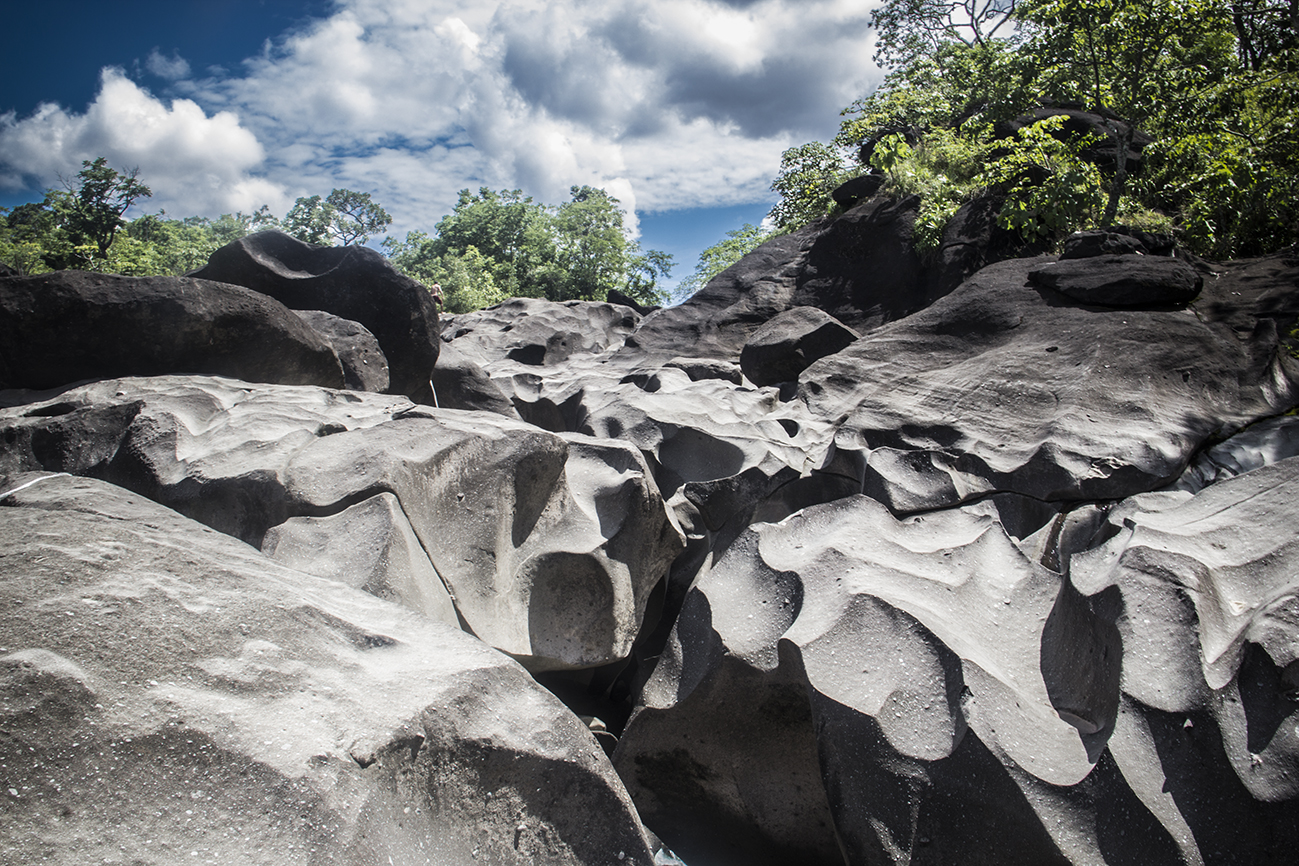 Vale da Lua - Alto Paraíso de Goiás - GO